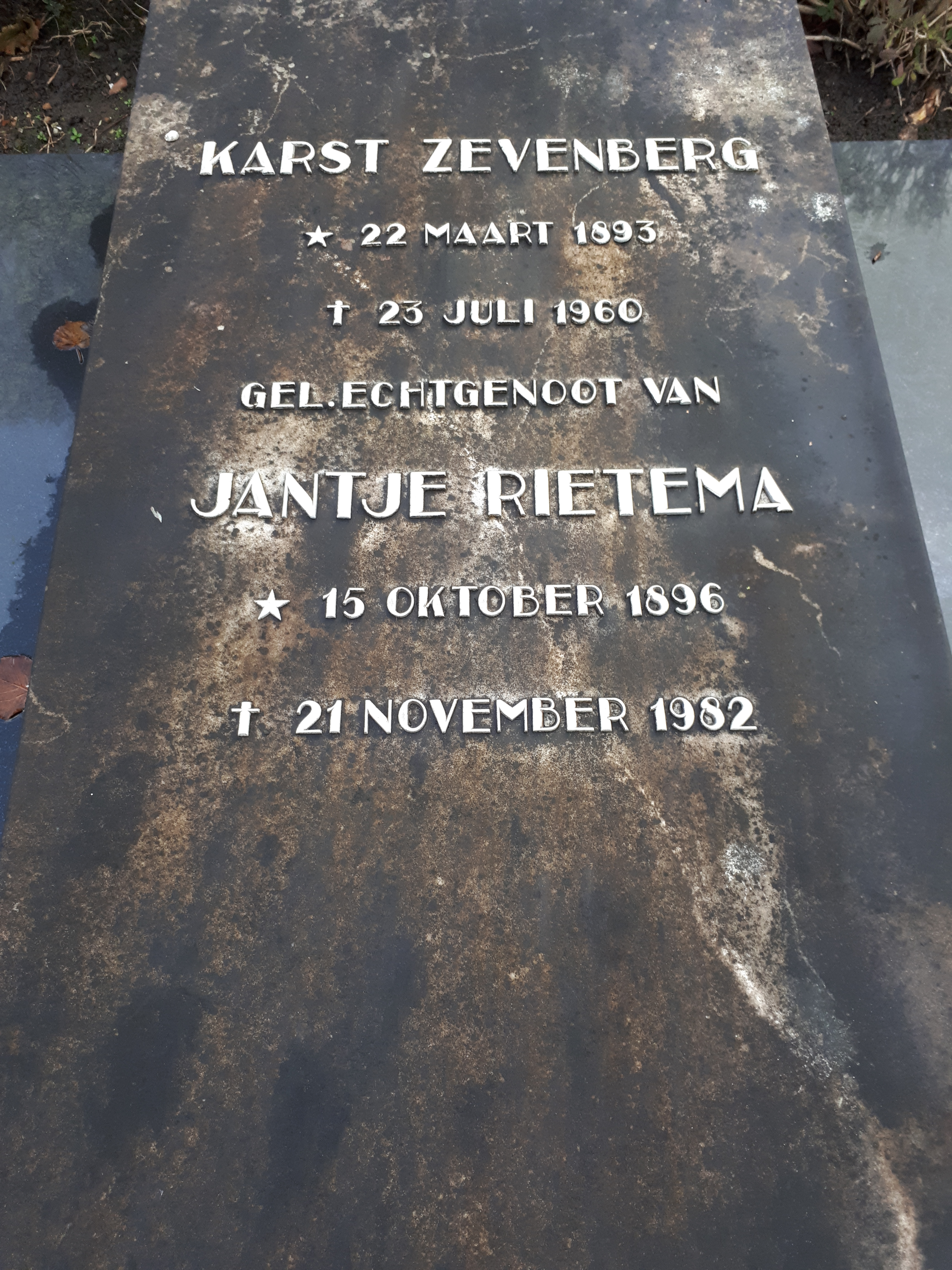 Het gedenkteken op het graf van architect Karst Zevenberg (1893-1960) en zijn vrouw Jantje Rietema (1896-1982), gelegen op de Gemeentelijke Begraafplaats aan de Schoolstraat in Bedum.